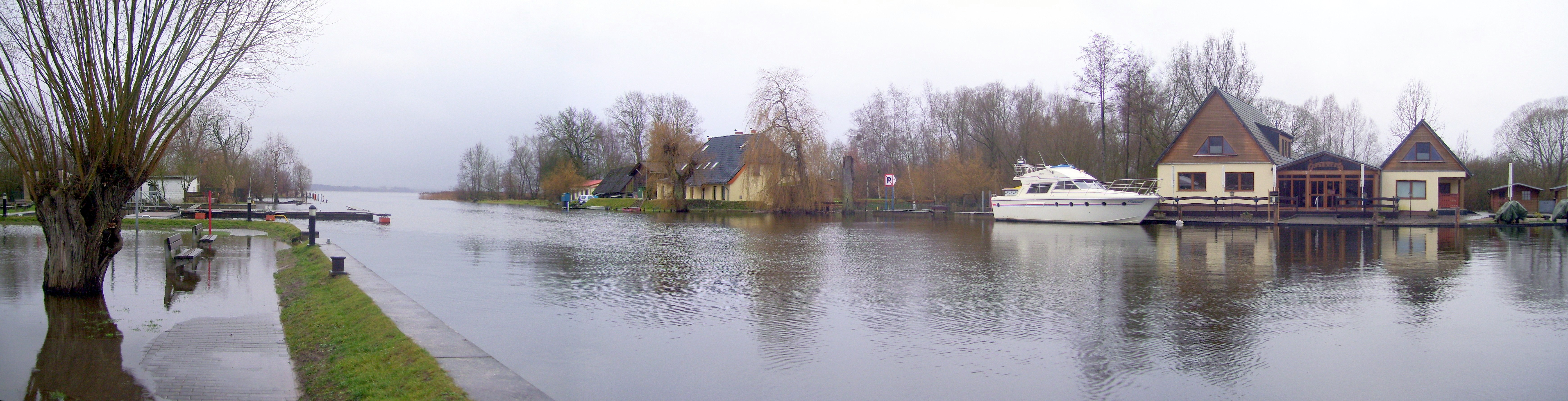 Aalbude, Abfluss der Peene aus dem Kummerower See